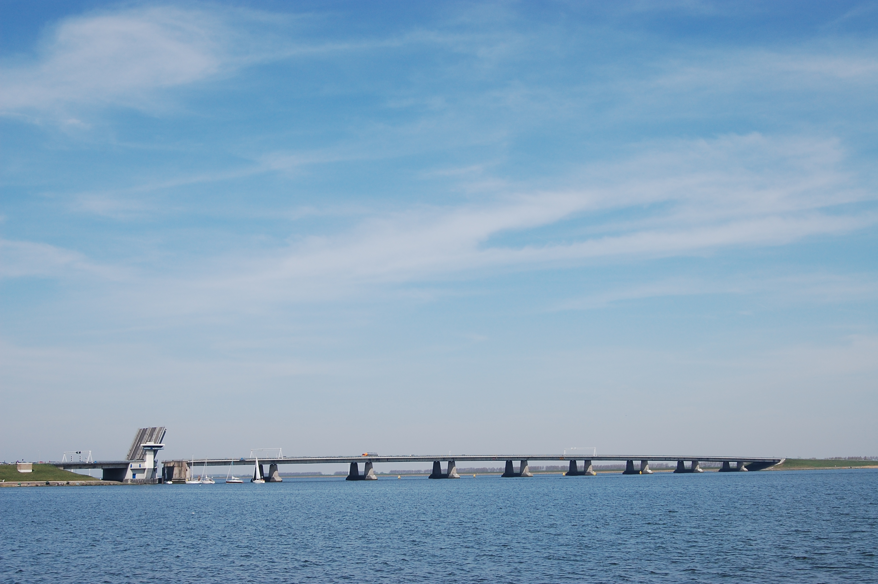 Ketelbrug